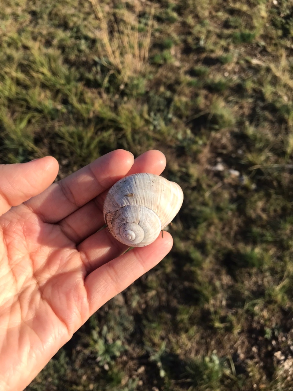 naleziště devonských a silurských vápencích zkamenělin na pp Hvížďalka